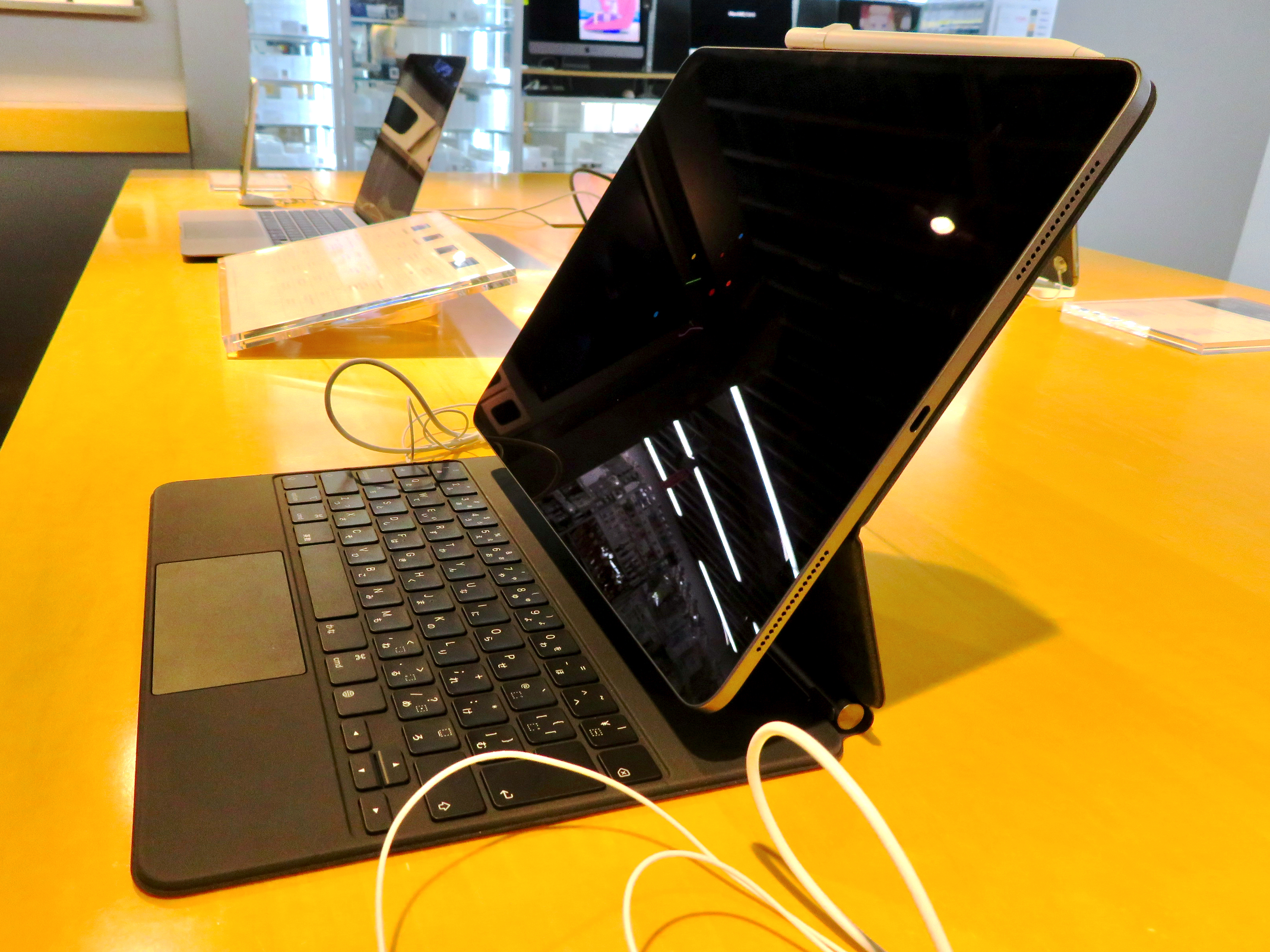 Magic Keyboard 装着中の iPad Pro 2020 12.9インチモデル。名古屋市内の家電量販店で撮影。